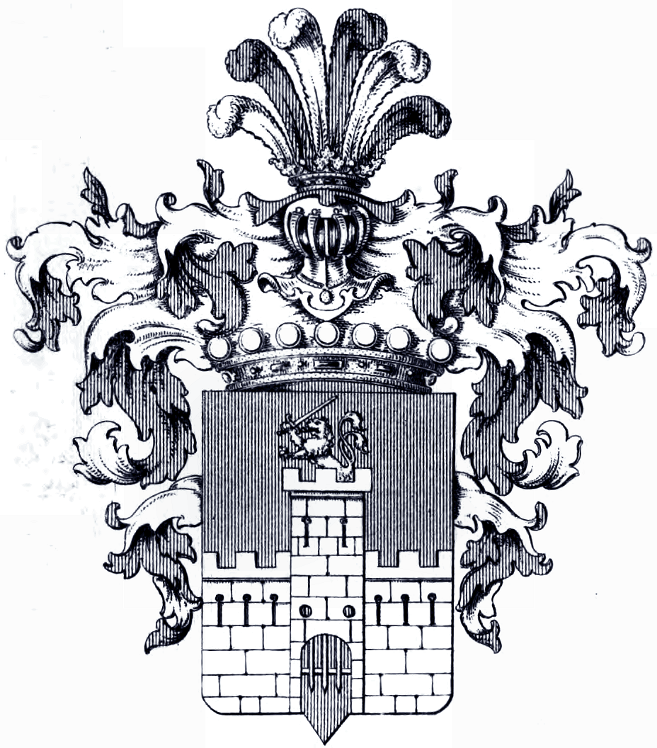 Wappen der Freiherrn von Simunich 1850/1858